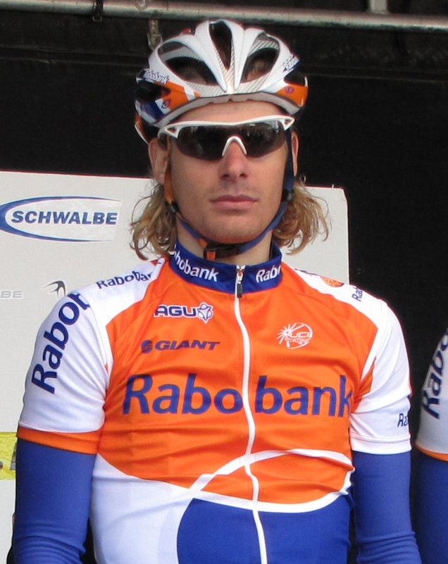 Dennis van Winden lors du Tour de Cologne 2010